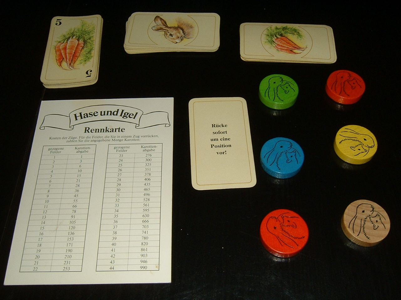 Zubehör des Spiels Hase und Igel